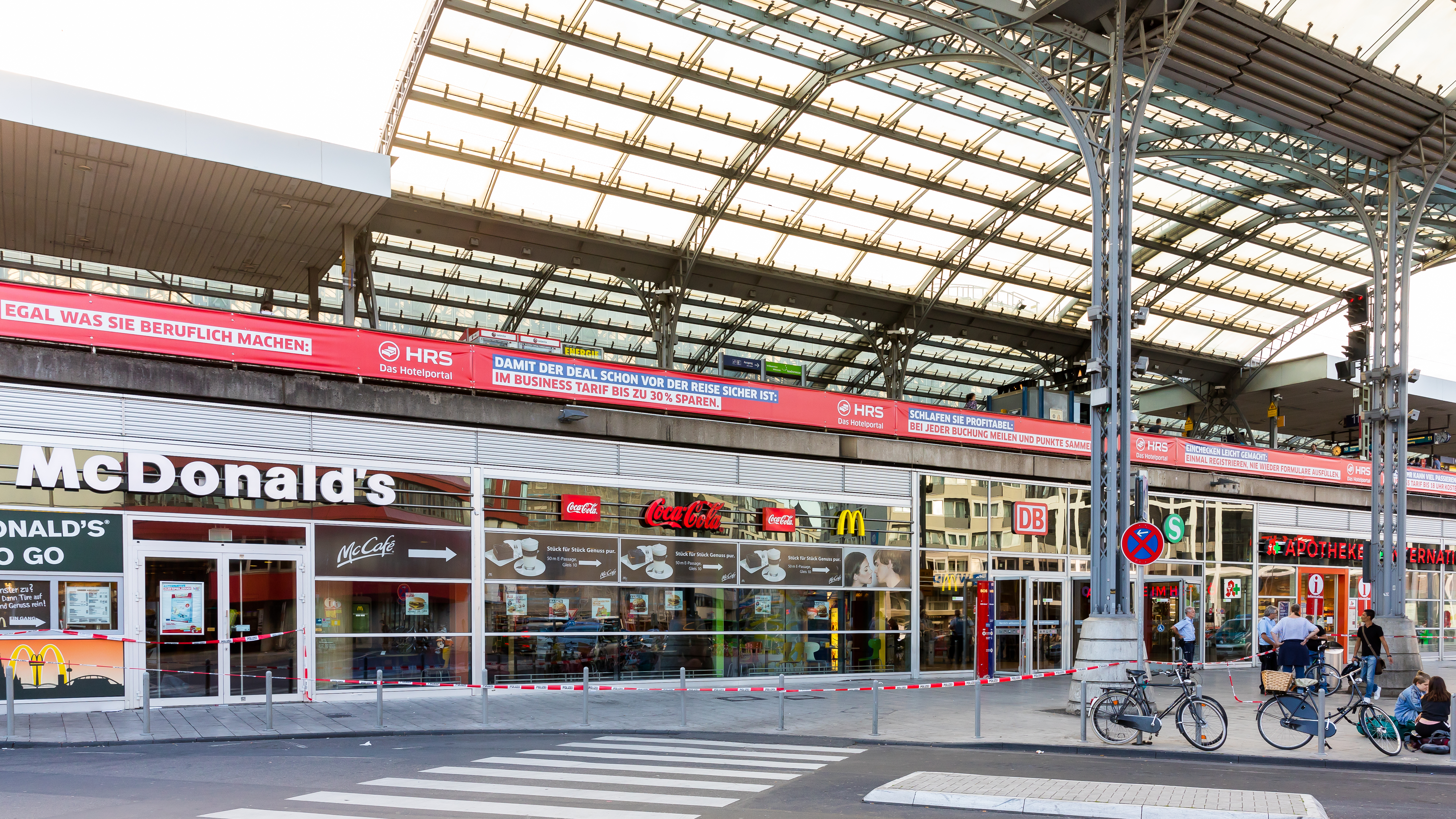 Köln Hbf, Eingang Breslauer Platz mit McDonalds und Bahnhofsapotheke einen Tag nach dem Brandanschlag mit Geiselnahme